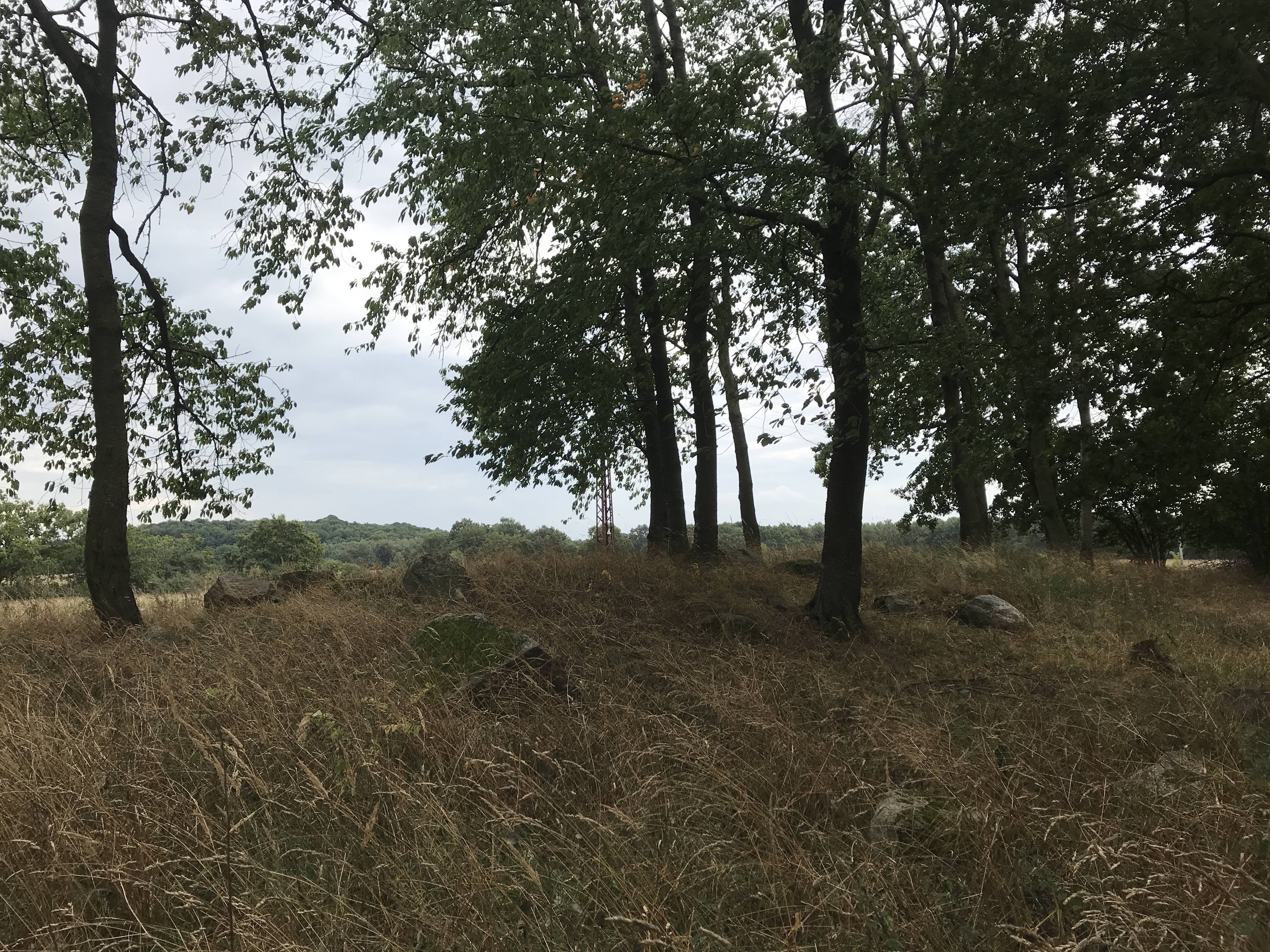 Die Großsteingräber bei Wehrland waren megalithische Grabanlagen der jungsteinzeitlichen Trichterbecherkultur in Vorpommern-Greifswald in Mecklenburg-Vorpommern